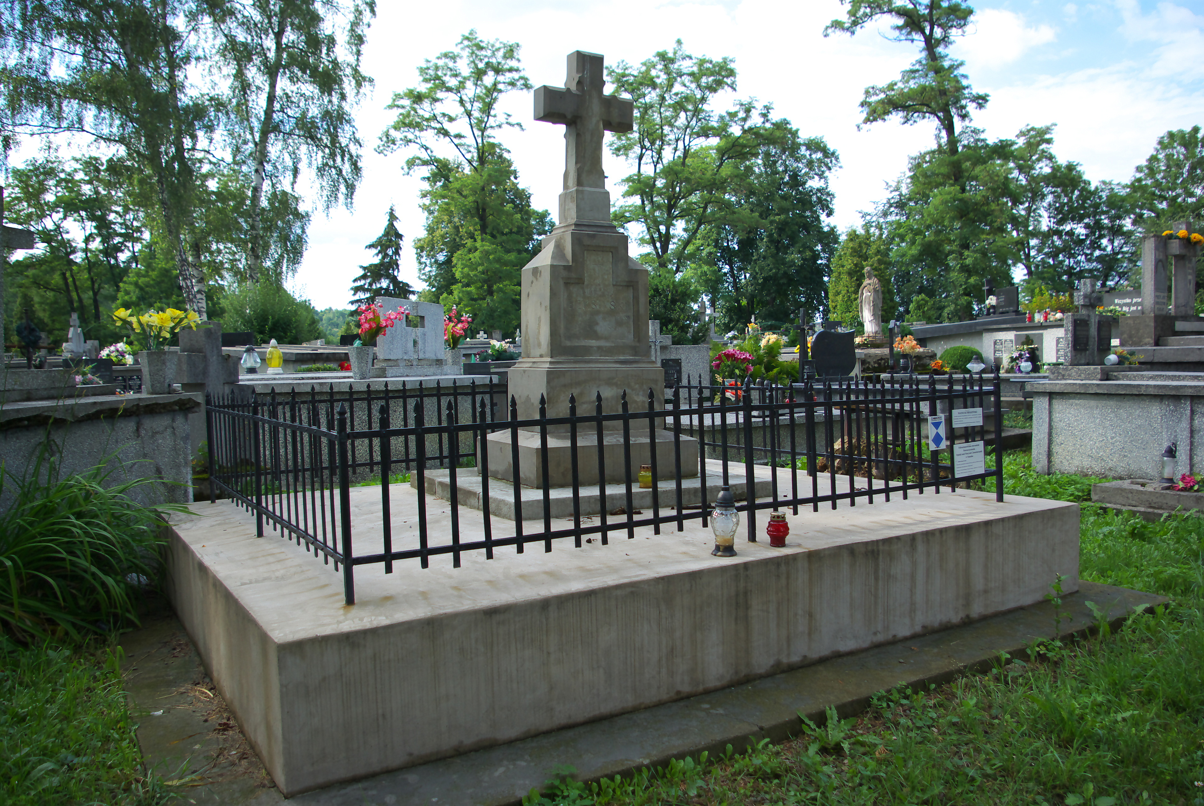 Grobowiec Mateusza Beksińskiego na Cmentarzu Centralnym w Sanoku (północna część).